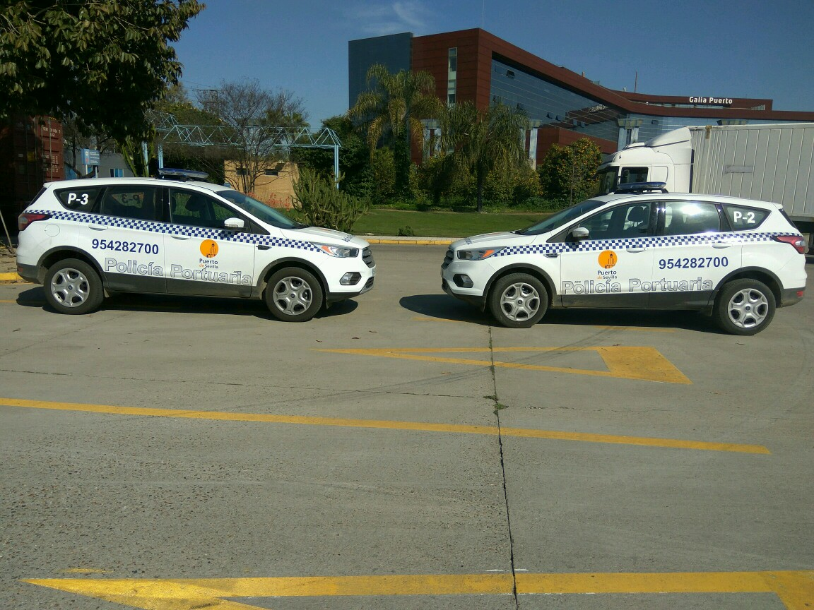 Vehículo de Policía Portuaria